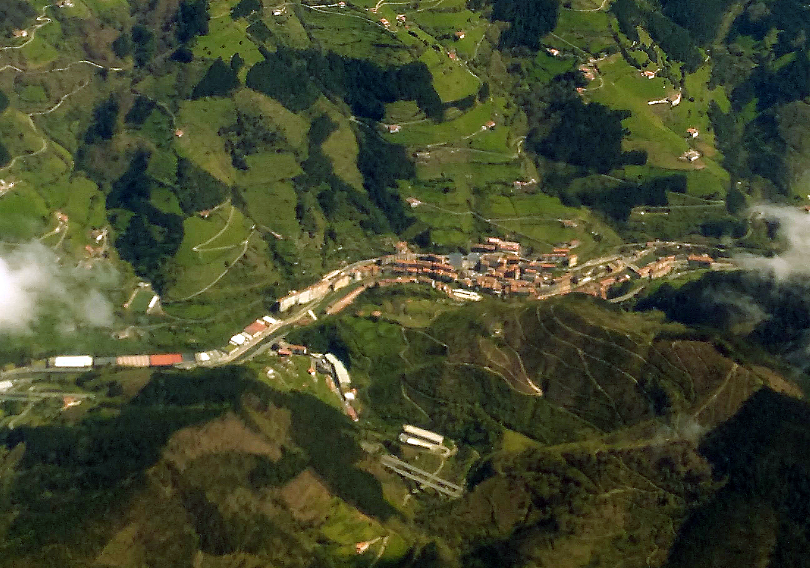 Soraluze, Gipuzkoa. Hegazkinetik egindako argazkia.